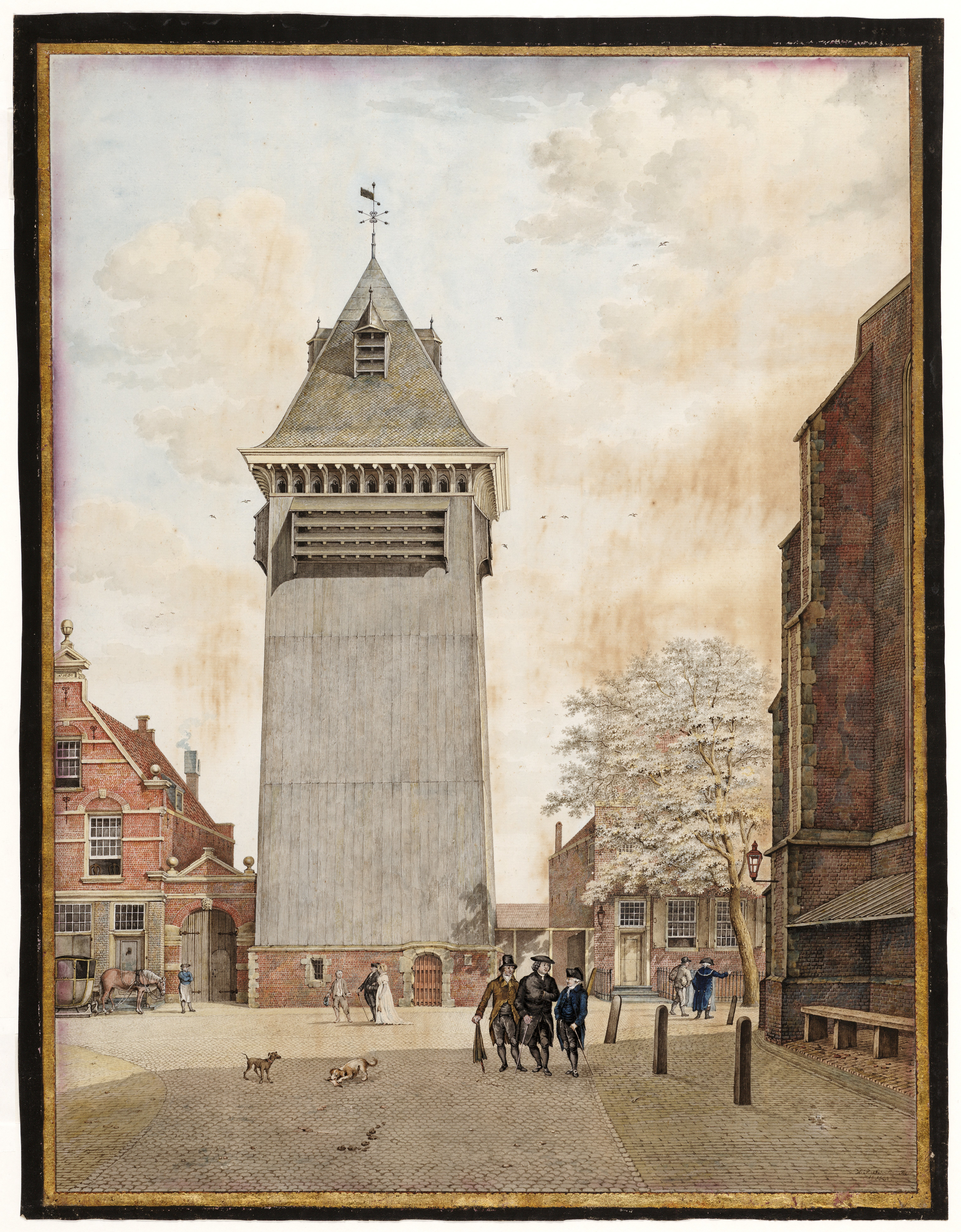 Gezicht op het Klokhuisplein met de klokhuistoren. Rechtsonder gesigneerd en gedateerd.